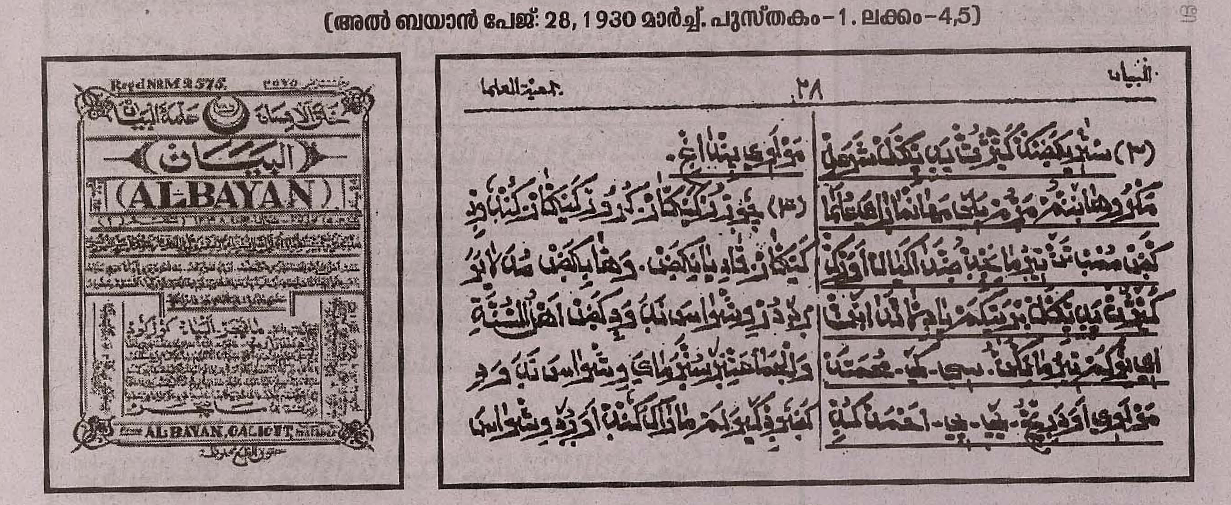 അറബി മലയാളം ടെക്സ്റ്റിന്റെ രൂപം